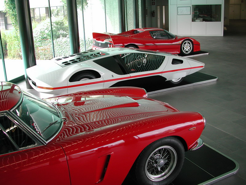 Left to Right, 250 GT Berlinetta SWB, Modulo, F50Ferraris im Museum Pininfarina